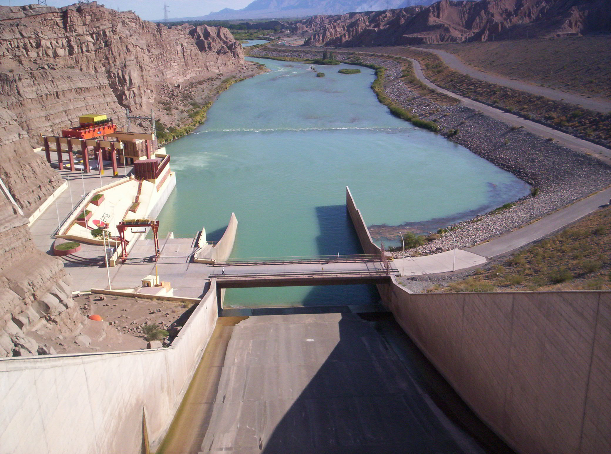 Fotografía de la Quebrada de Ullum, San Juan, Argentina